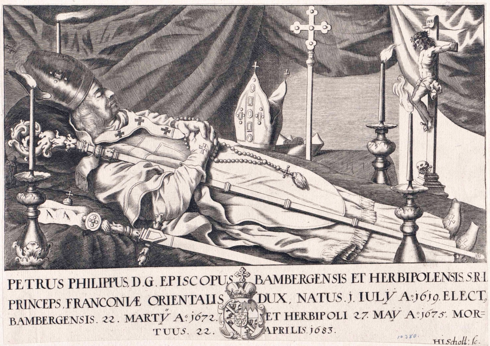 Peter Philipp von Dernbach (1619-1683), Fürstbischof von Würzburg und Bamberg, auf dem Sterbebett